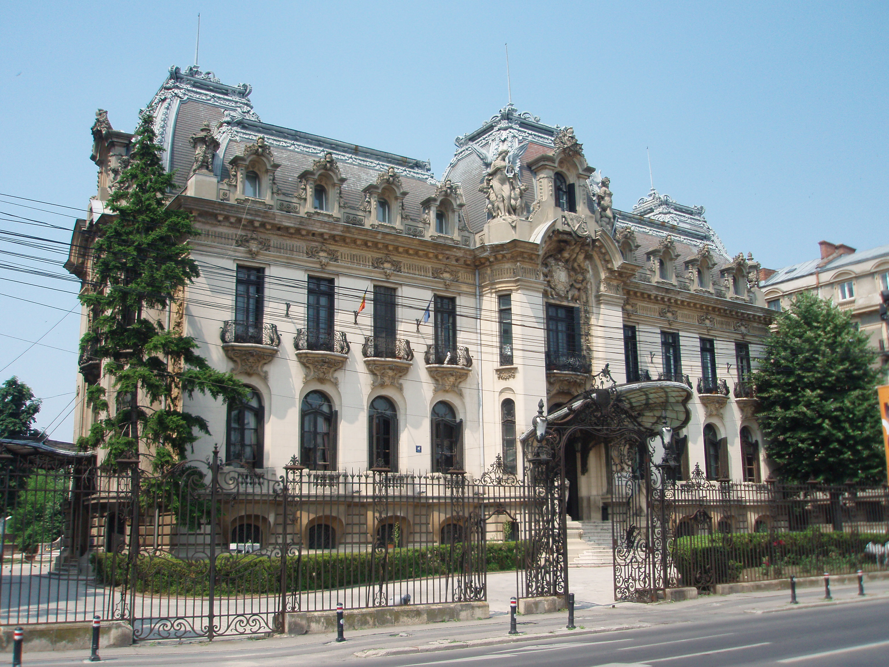 Muzeul Naţional George Enescu